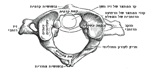 אטלס במבט על